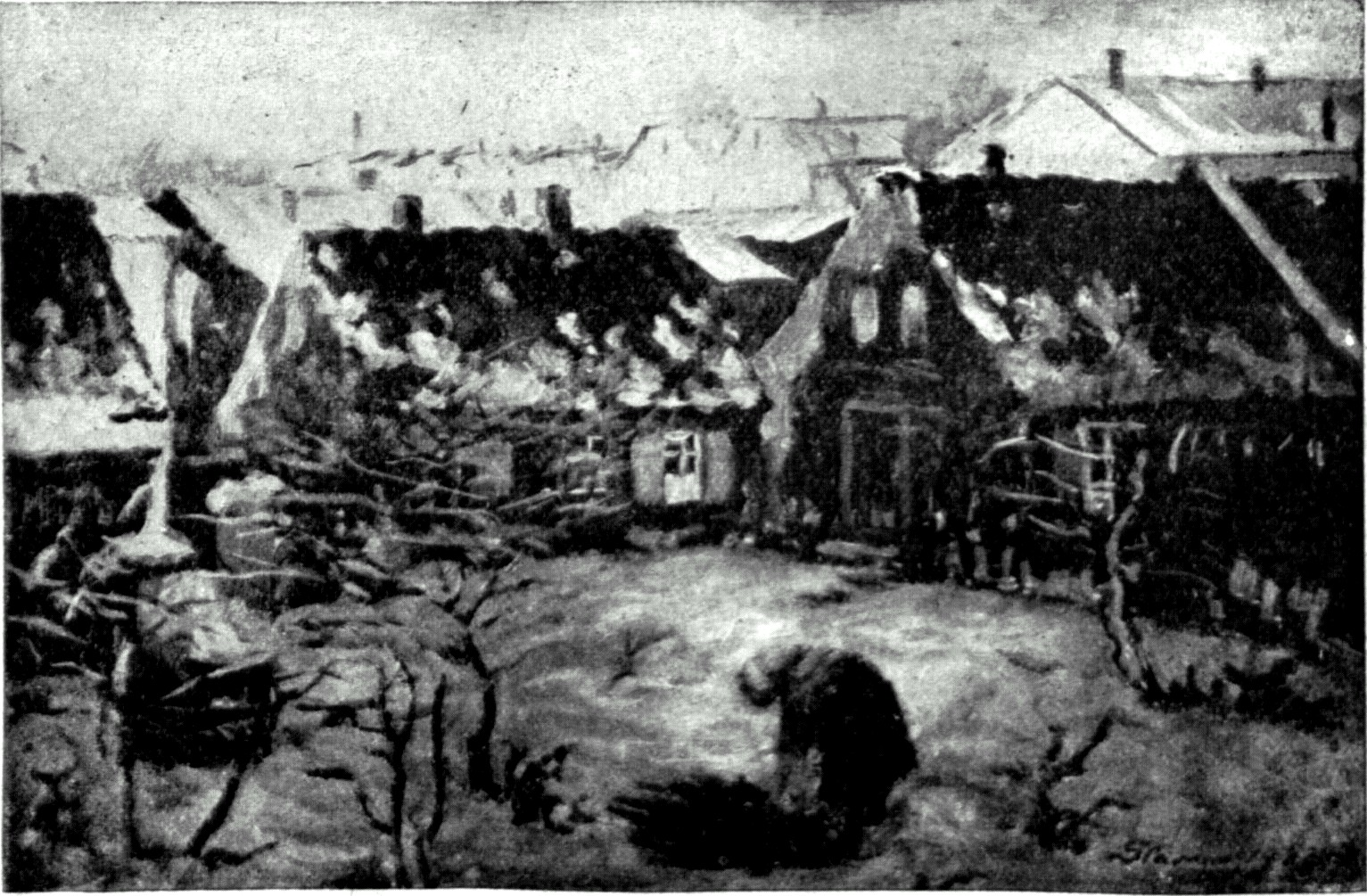 Kahlhorst